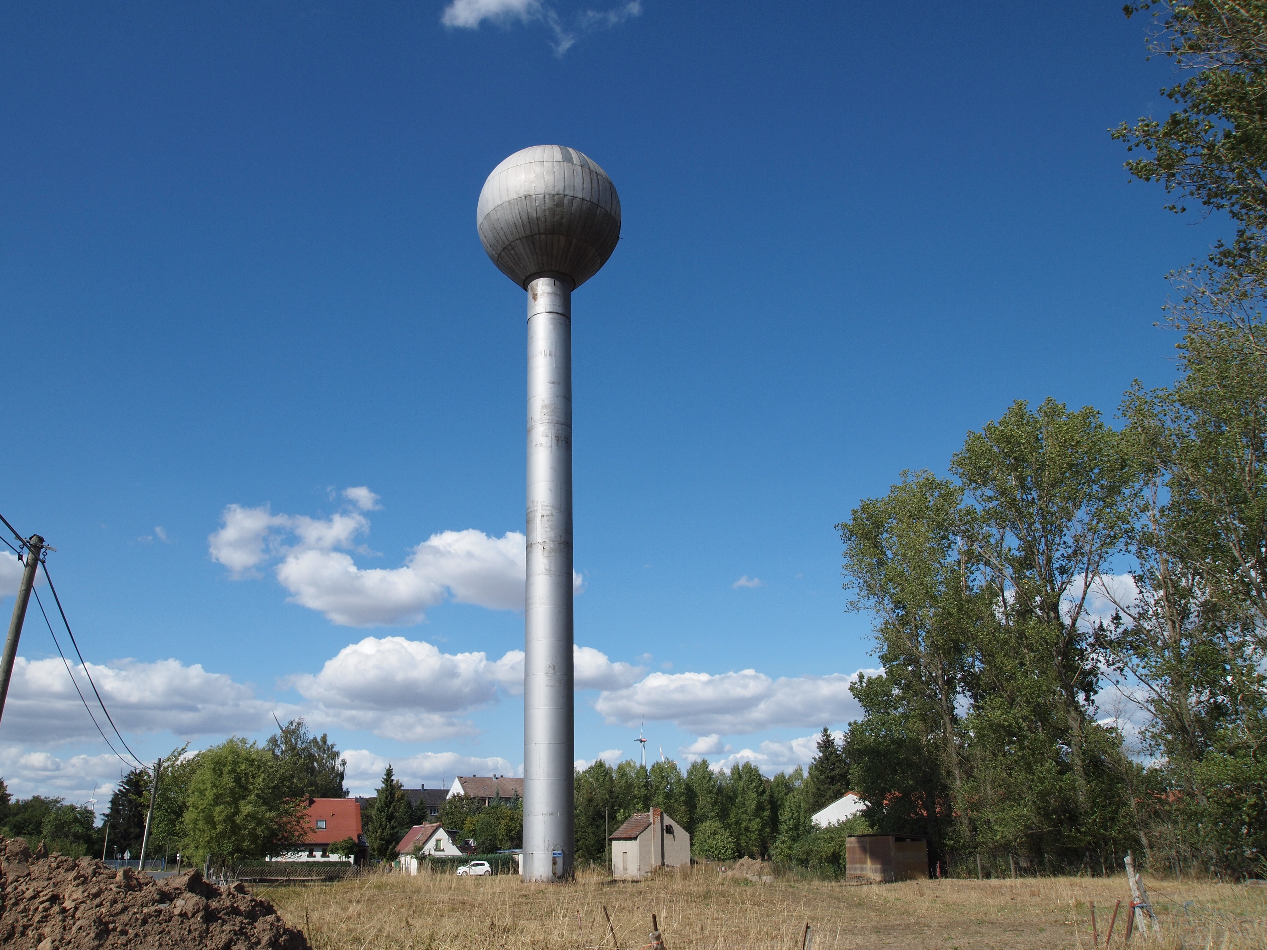 Blick von Süden auf Molau mit Wasserturm, Burgenlandkreis, Sachsen-Anhalt